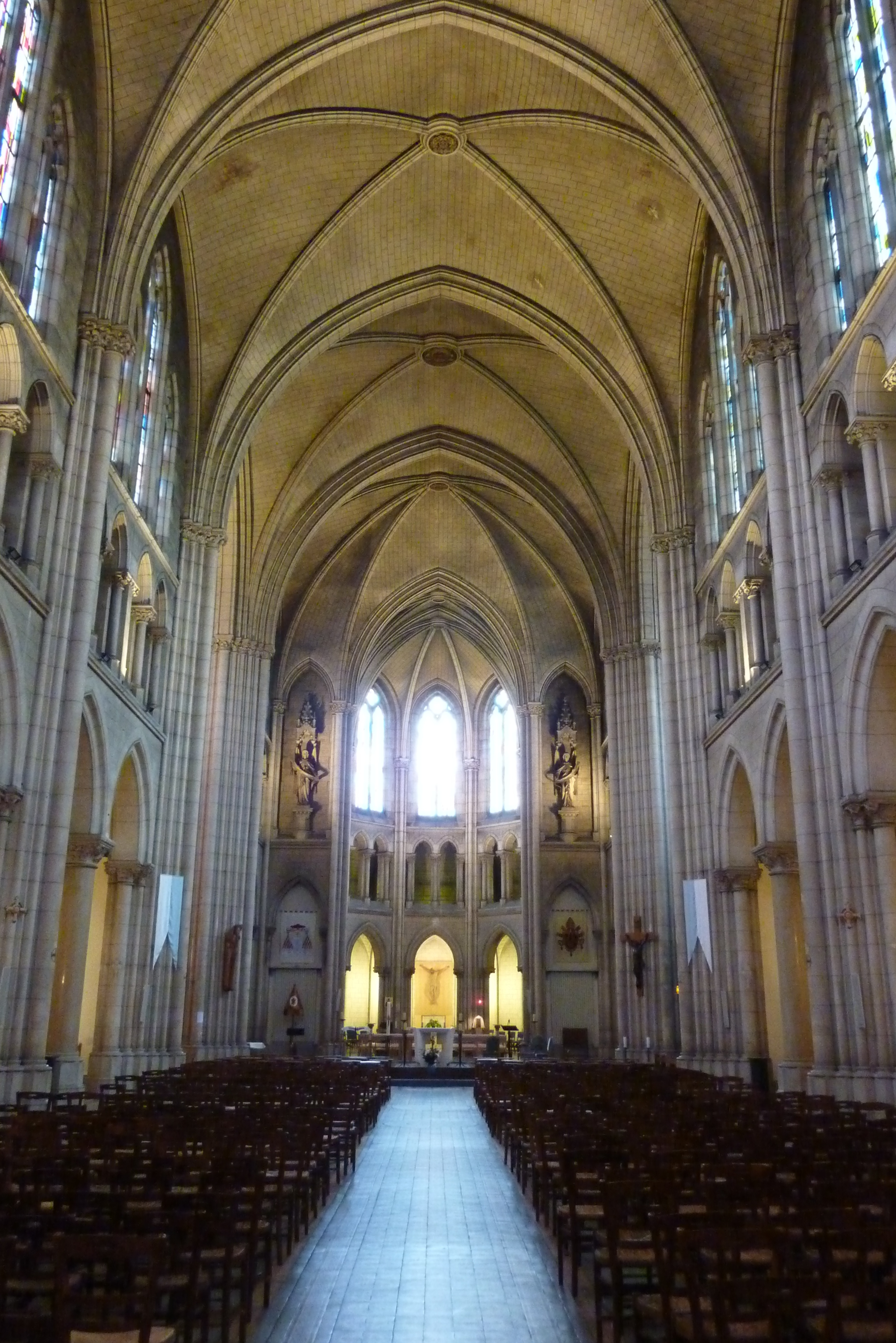 Katholische Pfarrkirche Notre-Dame-du-Perpétuel-Secours im 11. Arrondissement von Paris, Innenansicht